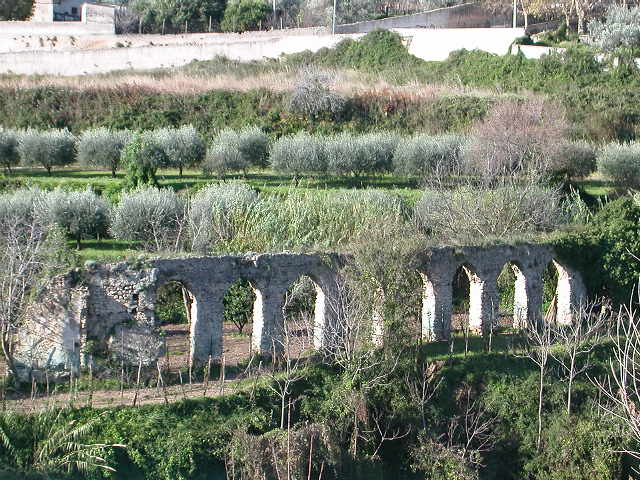 Acquedotto medievale visibile sulla collina di Eboli (SA)